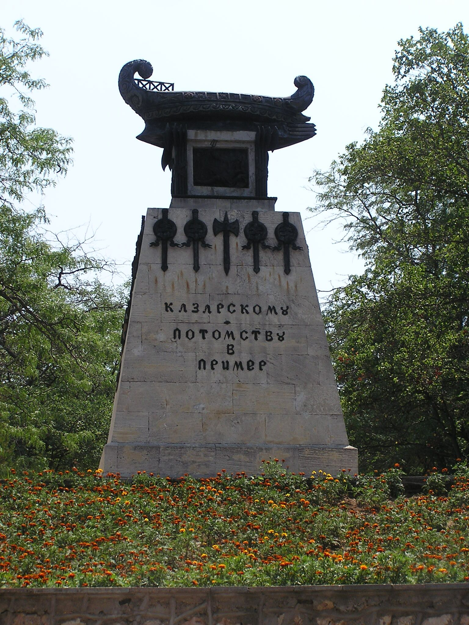 Севастополь. Памятник Казарскому